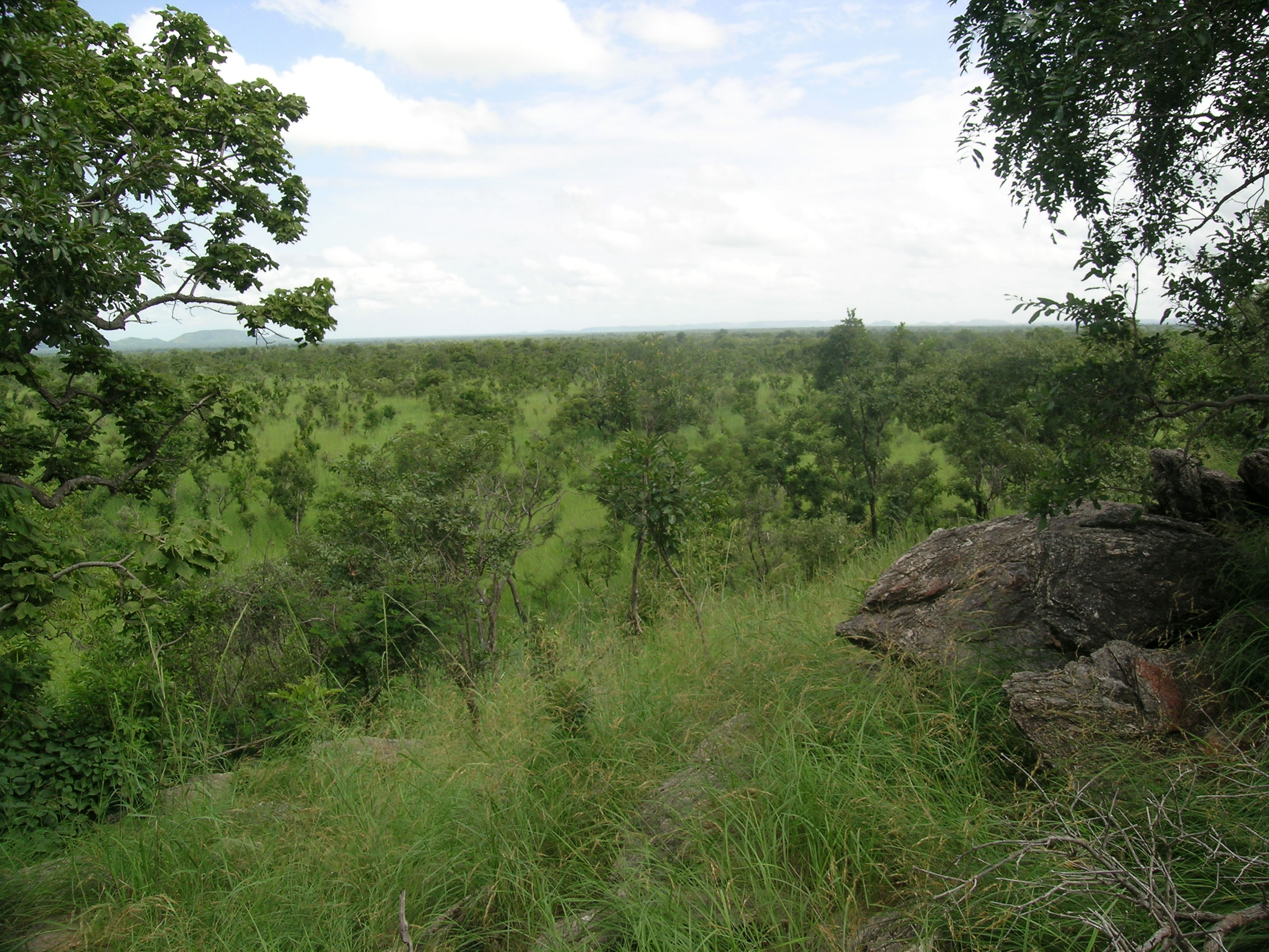 Vergesig oor die boomveld van die Pendjari Nasionale Park in Benin, vanaf 'n voetheuwel van die Atakorabergreeks.